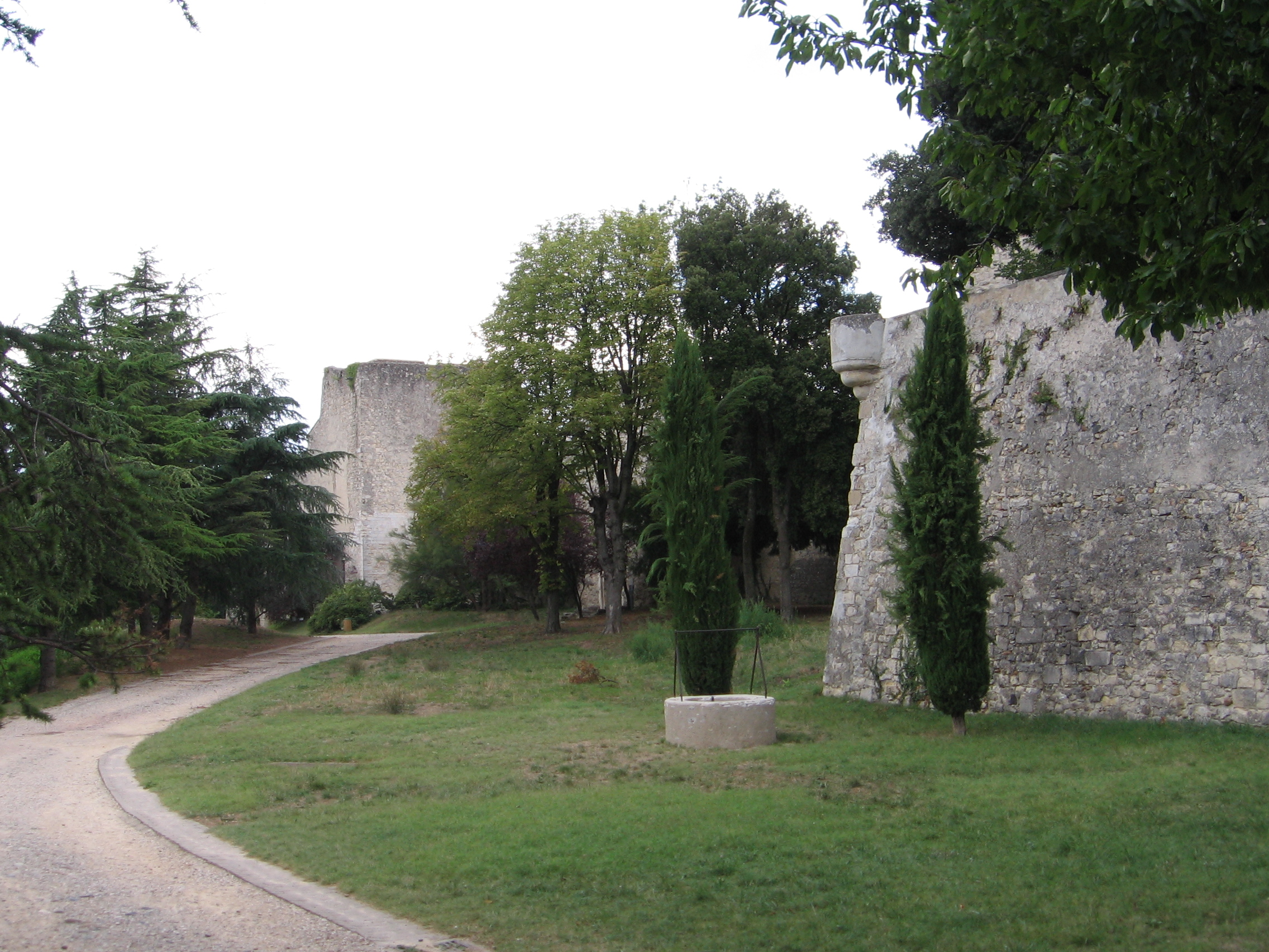 Château des Adhémar, Montelimar